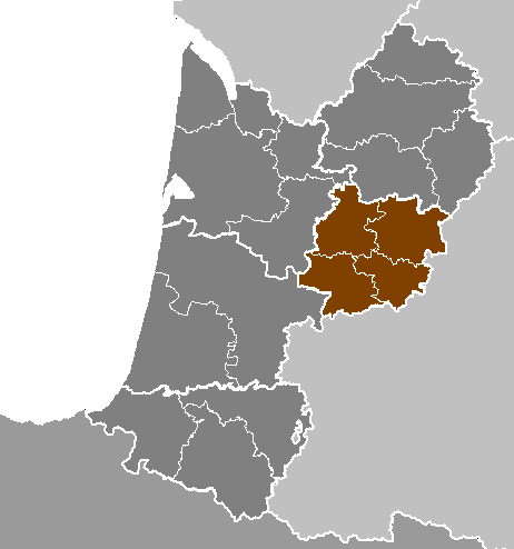 Maps of arrondissements and cantons of France: Département de Lot-et-Garonne.PNG (Région Aquitaine)